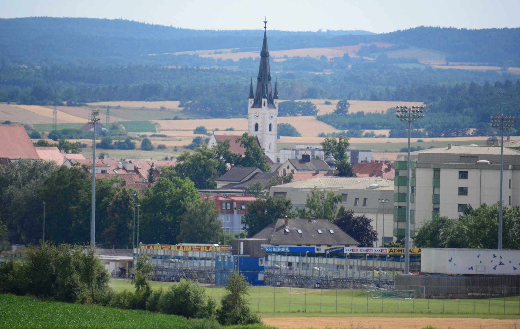 Horn vom Preußenfriedhof Breiteneich aus gesehen